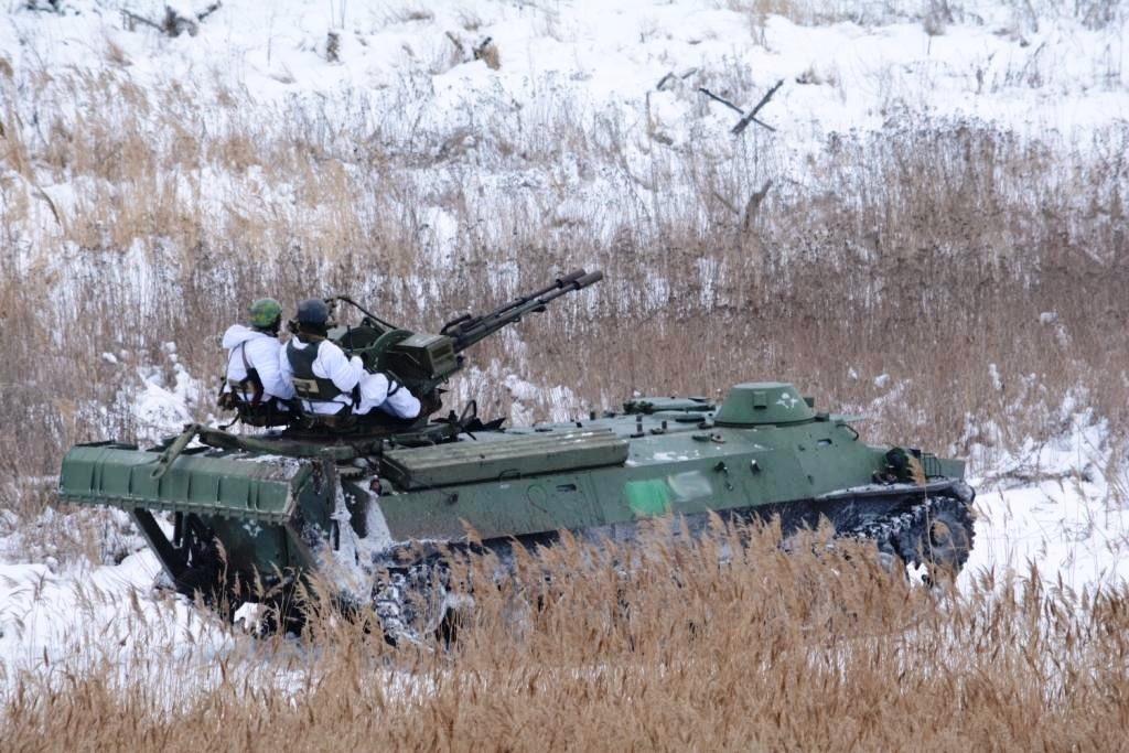 Десантники 81 окремої аеромобільної бригади ВДВ успішно відпрацювали навчально-бойові завдання На Донеччині триває активна бойова підготовка підрозділів 81 окремої аеромобільної бригади ВДВ Збройних Сил України. Так, на одному із загальновійськових полігонів, десантники відпрацьовували навчально-бойові завдання під час наступу відділень та взводів за підтримки штатних артилерійських підрозділів, а також при умовах роботи артилерії противника. Навчання проводились як в день, так і в ночі з використанням штатних засобів нічного бачення, новітніх тепловізійних прицілів та тепловізорів.